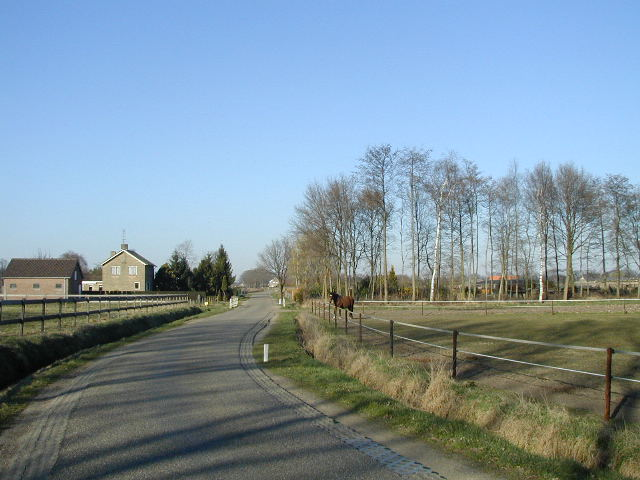 De locatie van het middeleeuws goed Ter Vloet in Deurne. Foto zelf gemaakt, 23 March 2003.